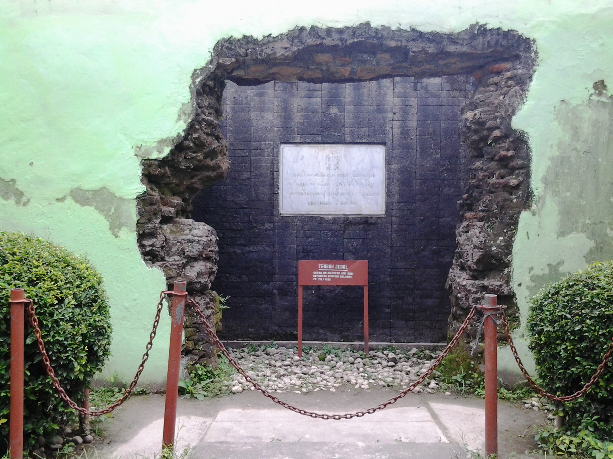 Tembol jebol di Kompleks Museum Pangeran Diponegoro ini diyakini sebagai jalan pasukan Pangeran Diponegoro untuk meloloskan diri dari kepungan tentara Belanda pada serangan tanggal 20 Juli 1825. Sebagian masyarakat percaya bahwa jebolnya tembok ini akibat tendangan Pangeran Diponegoro.